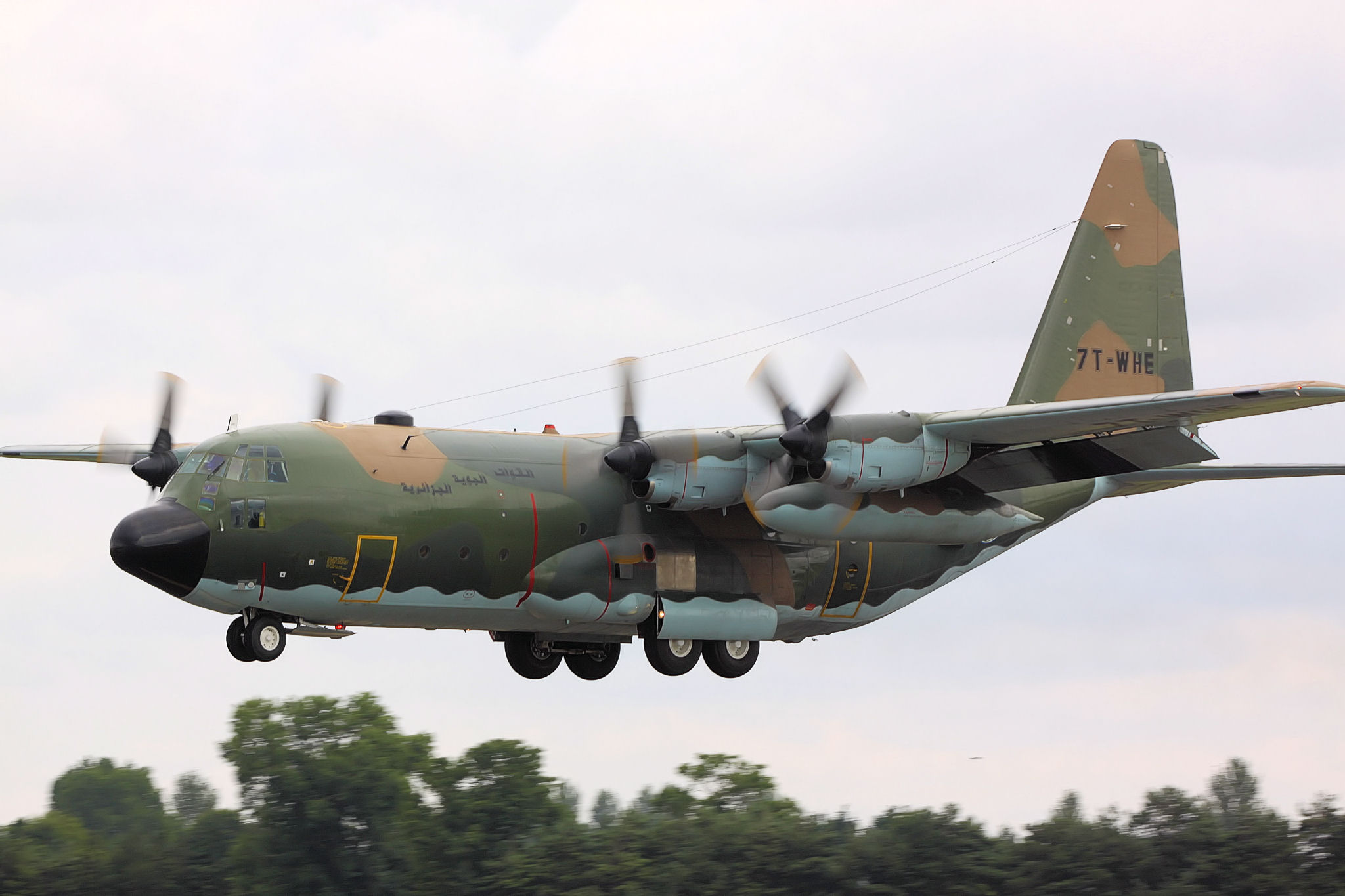 C130 Hercules - RIAT 2009